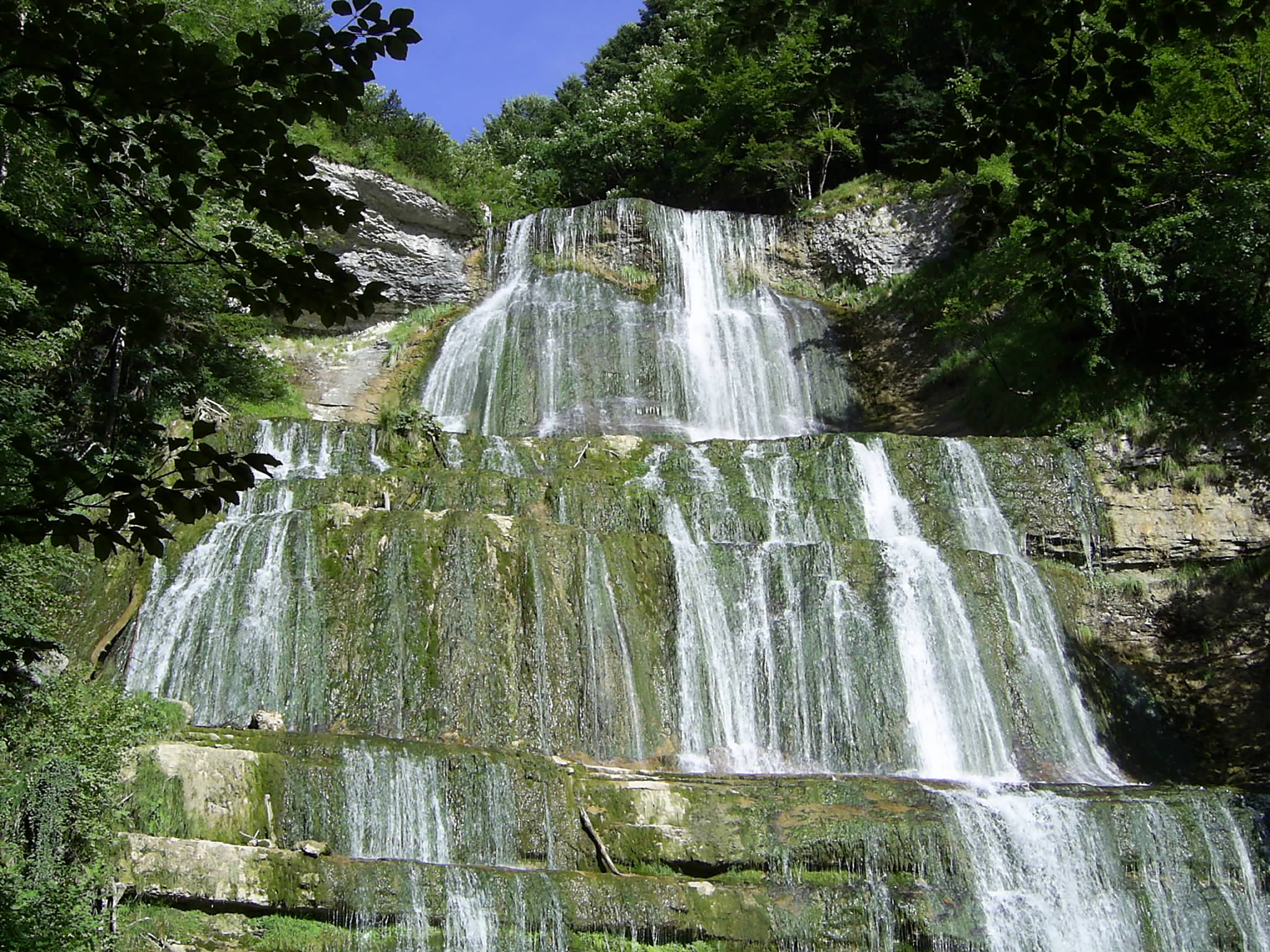 Cascade de l'évantail, cascades de l'Hérisson (Jura)